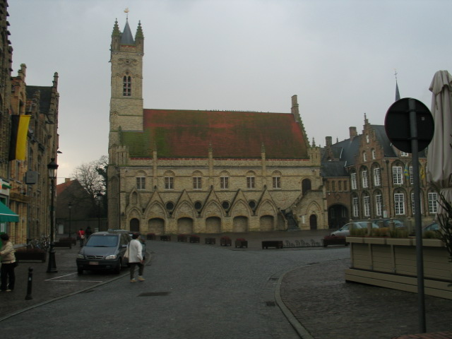 Belfort en stadshalle te Nieuwpoort